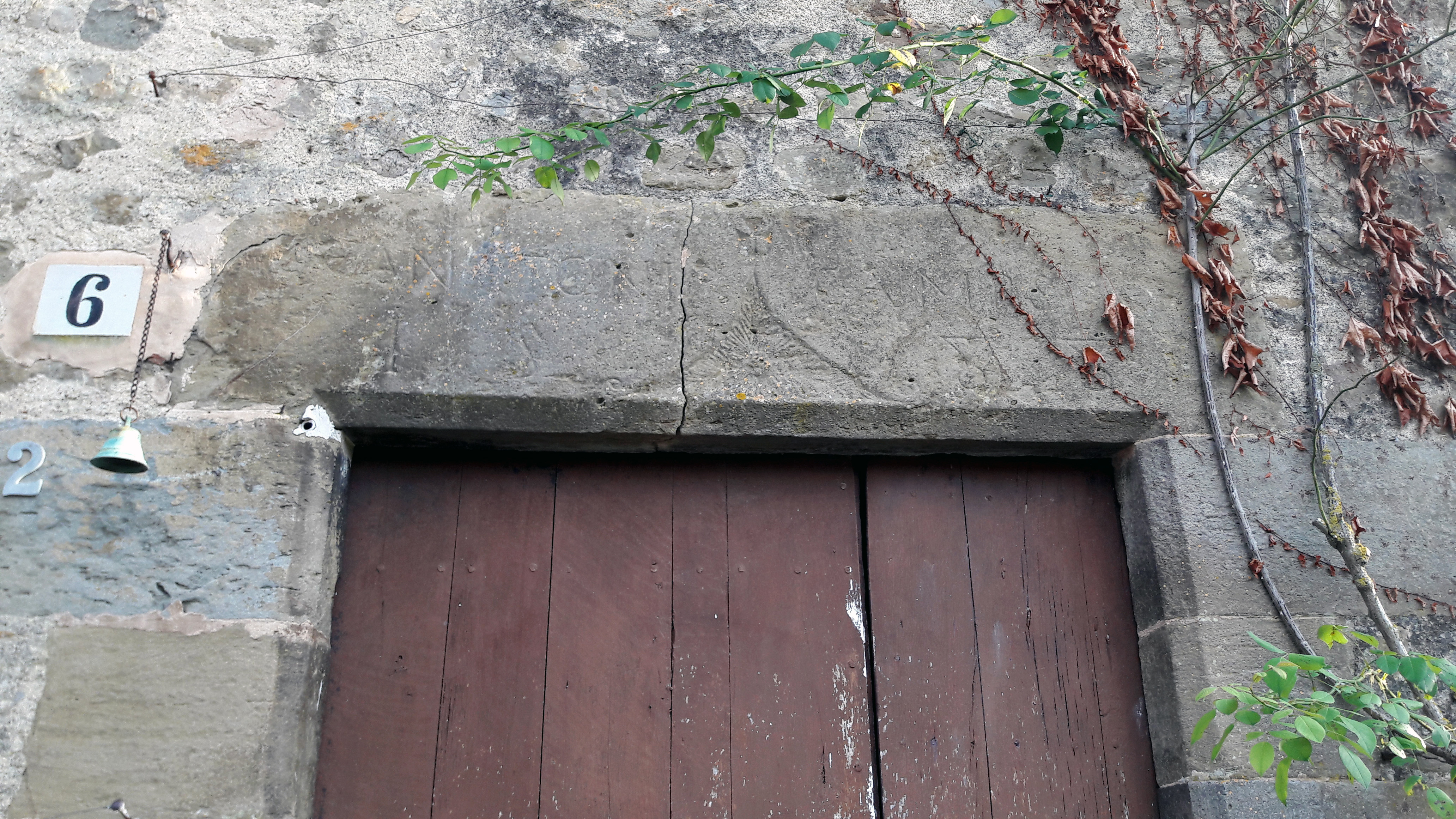 Casa al barri de Romeria, 6 (Mieres)